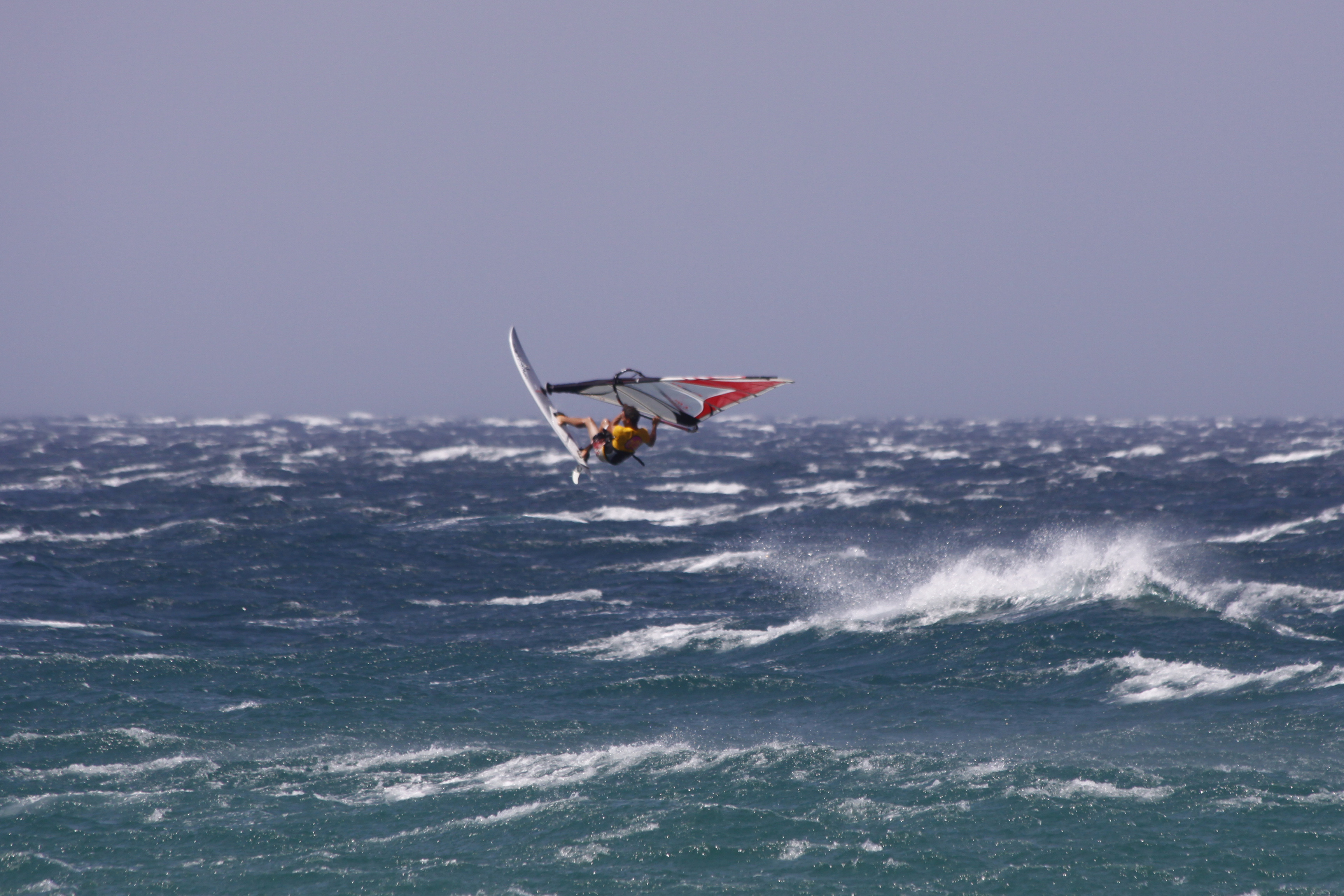 _MG_3657